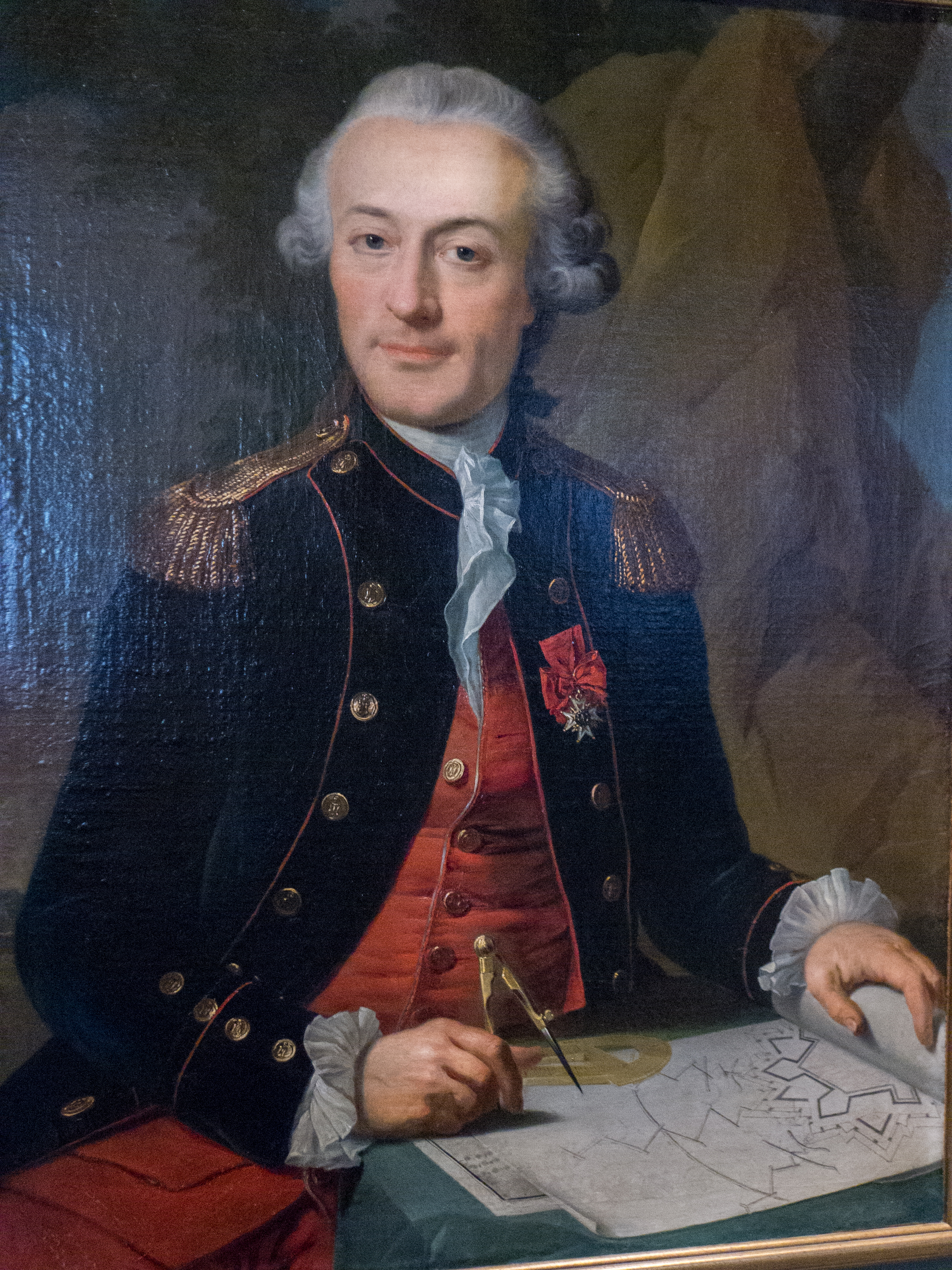 Le Michaud d'Arçon à sa table à dessin